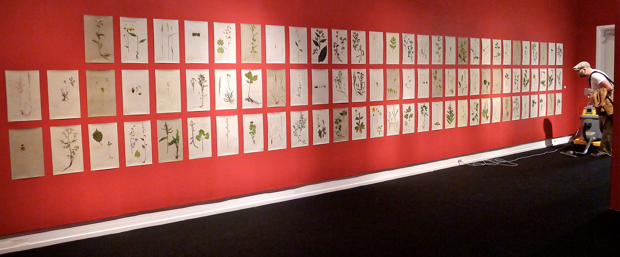 Barbro Maria Tiller - "Gjenstridig flora", installasjon 2010-2012, Høstutstillingen 2012. Foto Oda Bhar